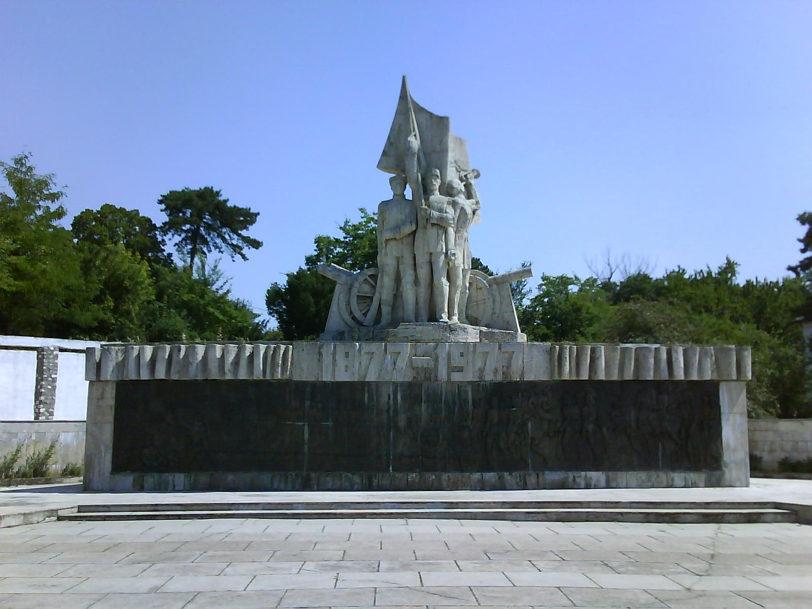 Monumentul din Calafat construit în 1977, autor sculptor Pavel Bucur, pentru a aniversa 100 de ani de la Războiul de Independenţă